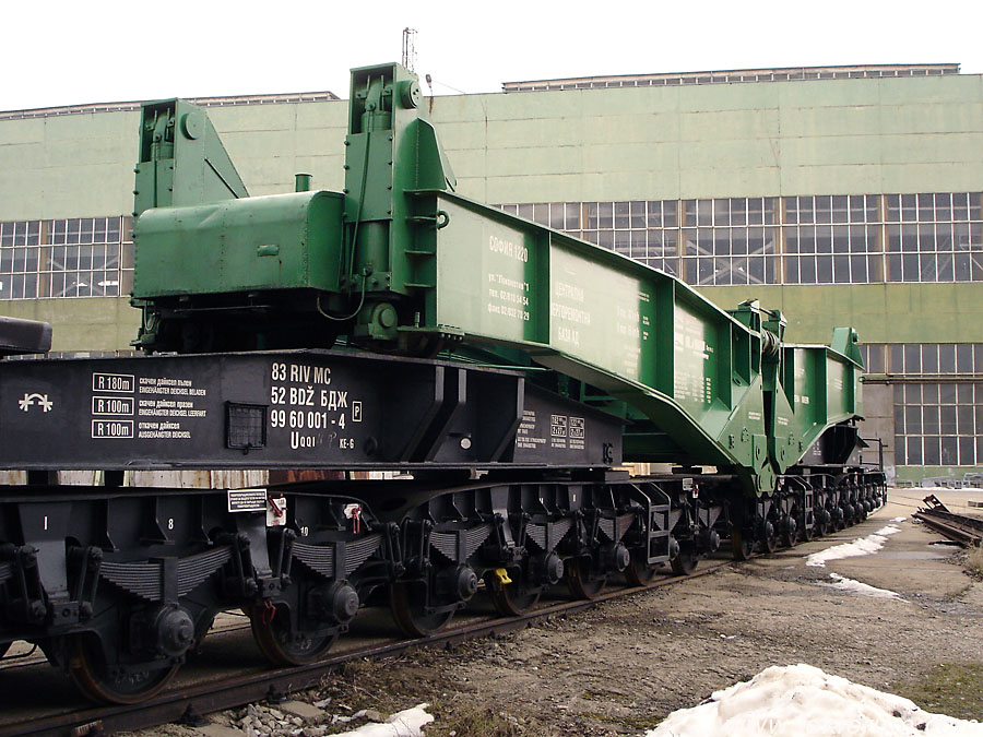 Единствената функционираща вагон-лодка в България, собственост на ЦЕРБ.